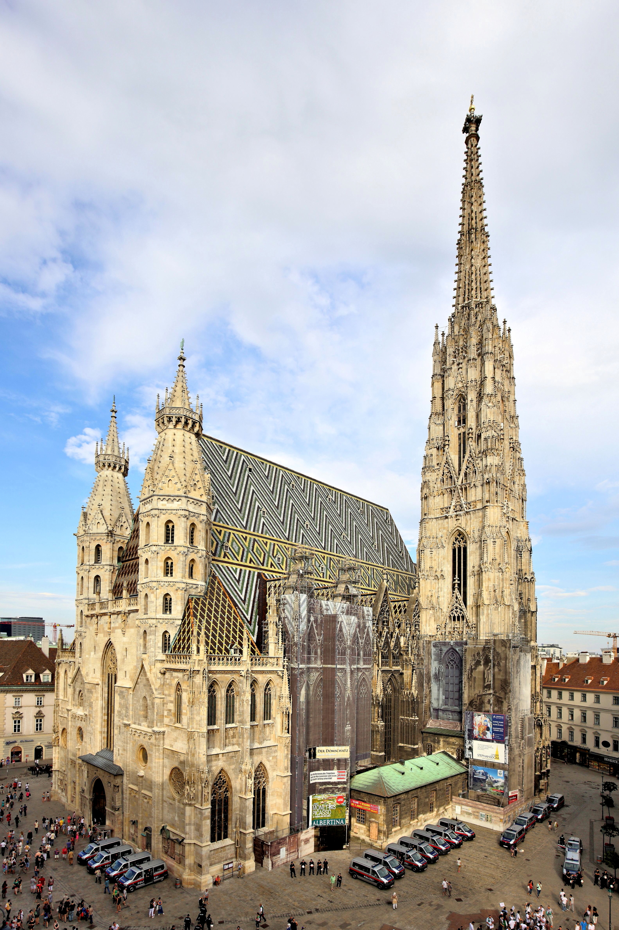 Westansicht des Stephansdomes in der österreichischen Bundeshauptstadt Wien. Die vielen Polizeiautos bewachen nicht den Stephansdom, sondern waren im Zuge der Kundgebung Al-Quds-Tag zugegen, die auf dem Stephansplatz stattfand.